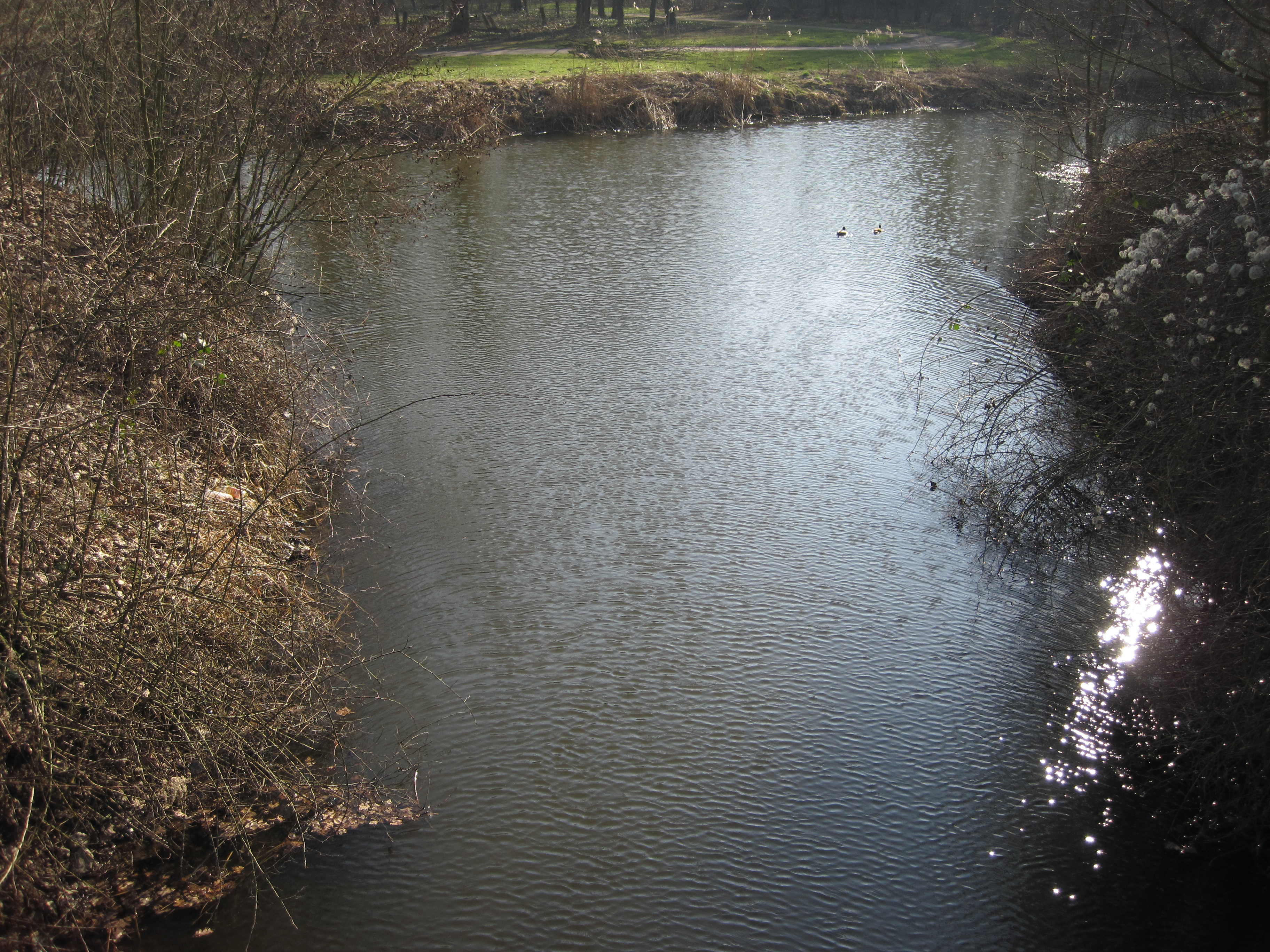 Das Foto zeigt die Binnengräfte auf dem Burghügel Mark in Hamm.